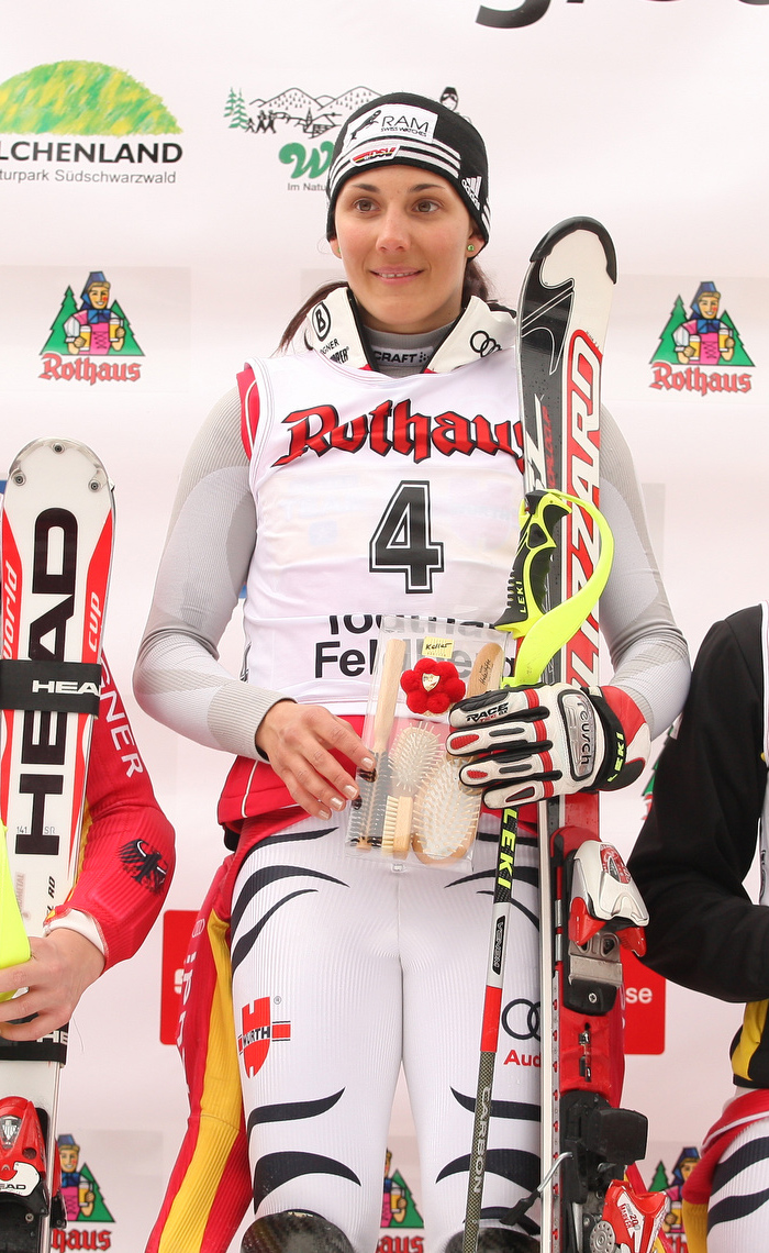 Nina Perner